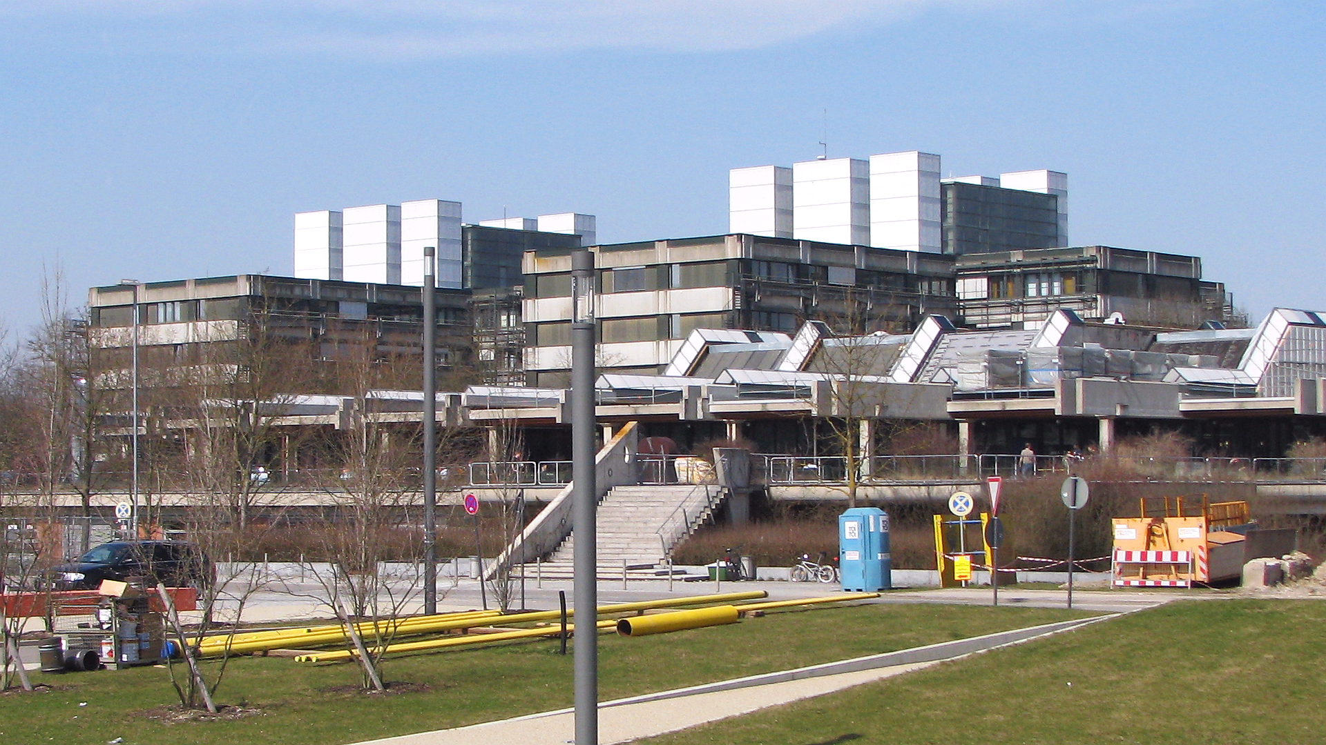 Einer der Gebäudekomplexe der Technischen Universität München (TUM) mit diversen Fakultäten, Instituten und Teilbibliotheken im Hochschul- und Forschungszentrum in Garching. Foto Wolfgang Pehlemann IMG_1588